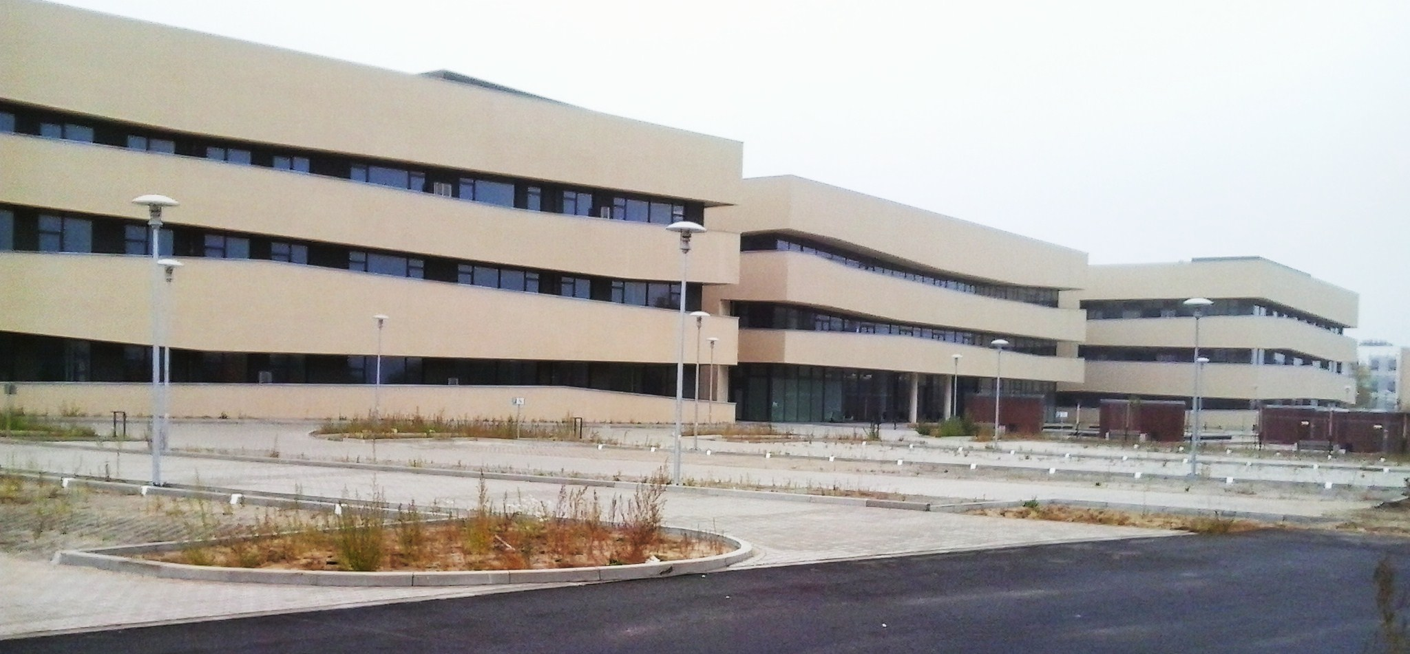 Wielkopolskie Centrum Zaawansowanych Technologii, Kampus Morasko, Poznań.